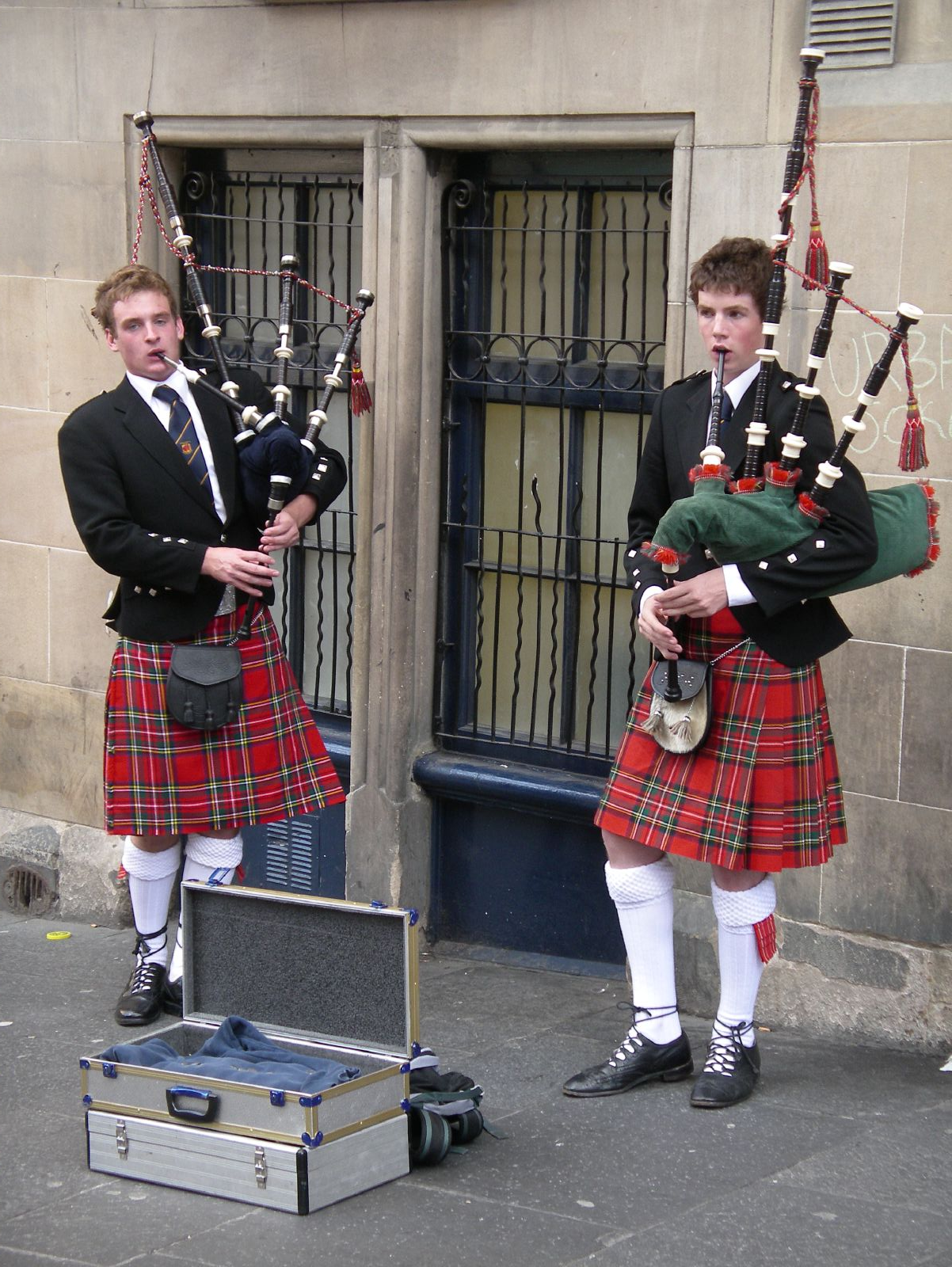 Bagpipers